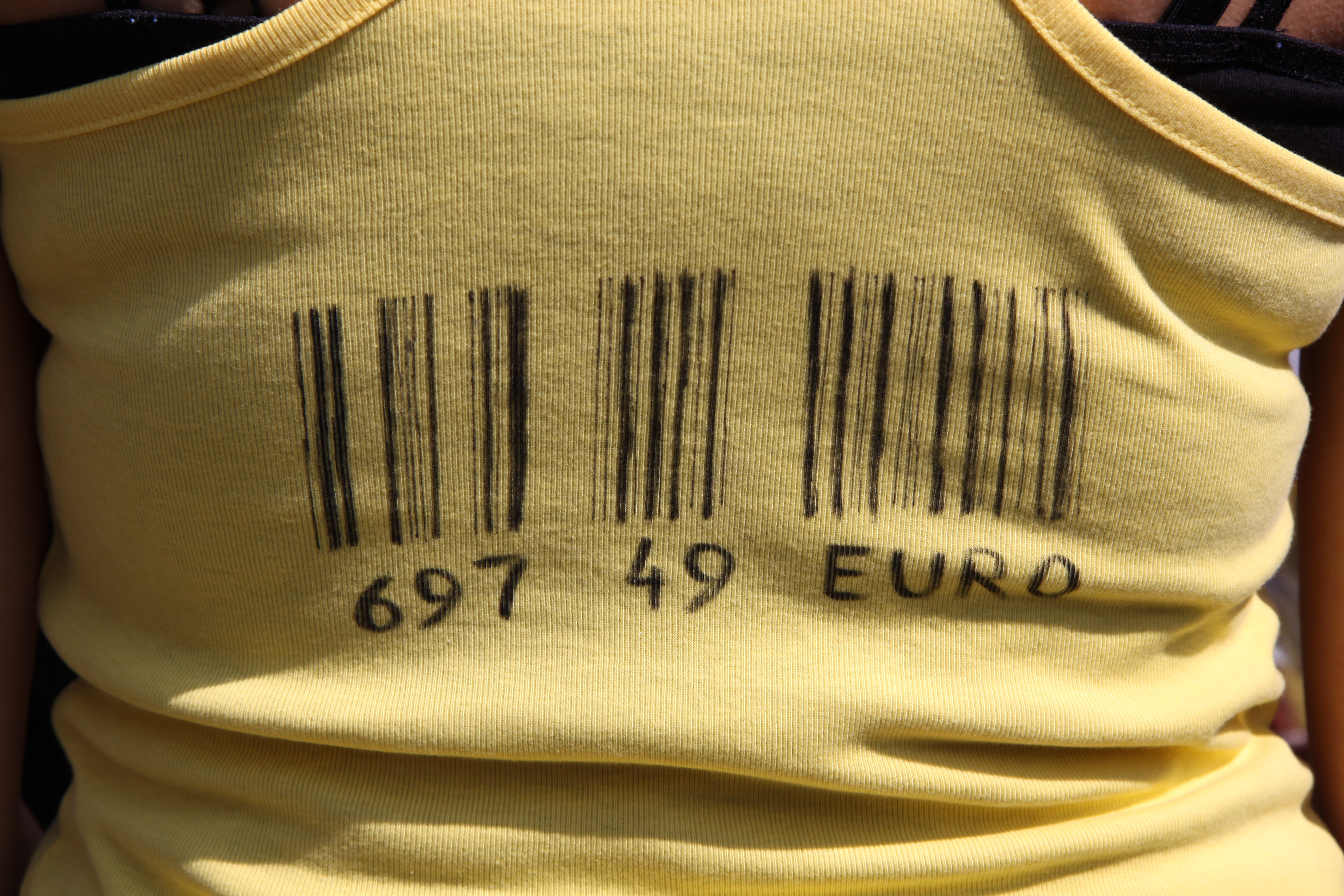 Teilnehmer der großen Demonstration beim Bundesweiten Bildungsstreiks 2009 in Göttingen.